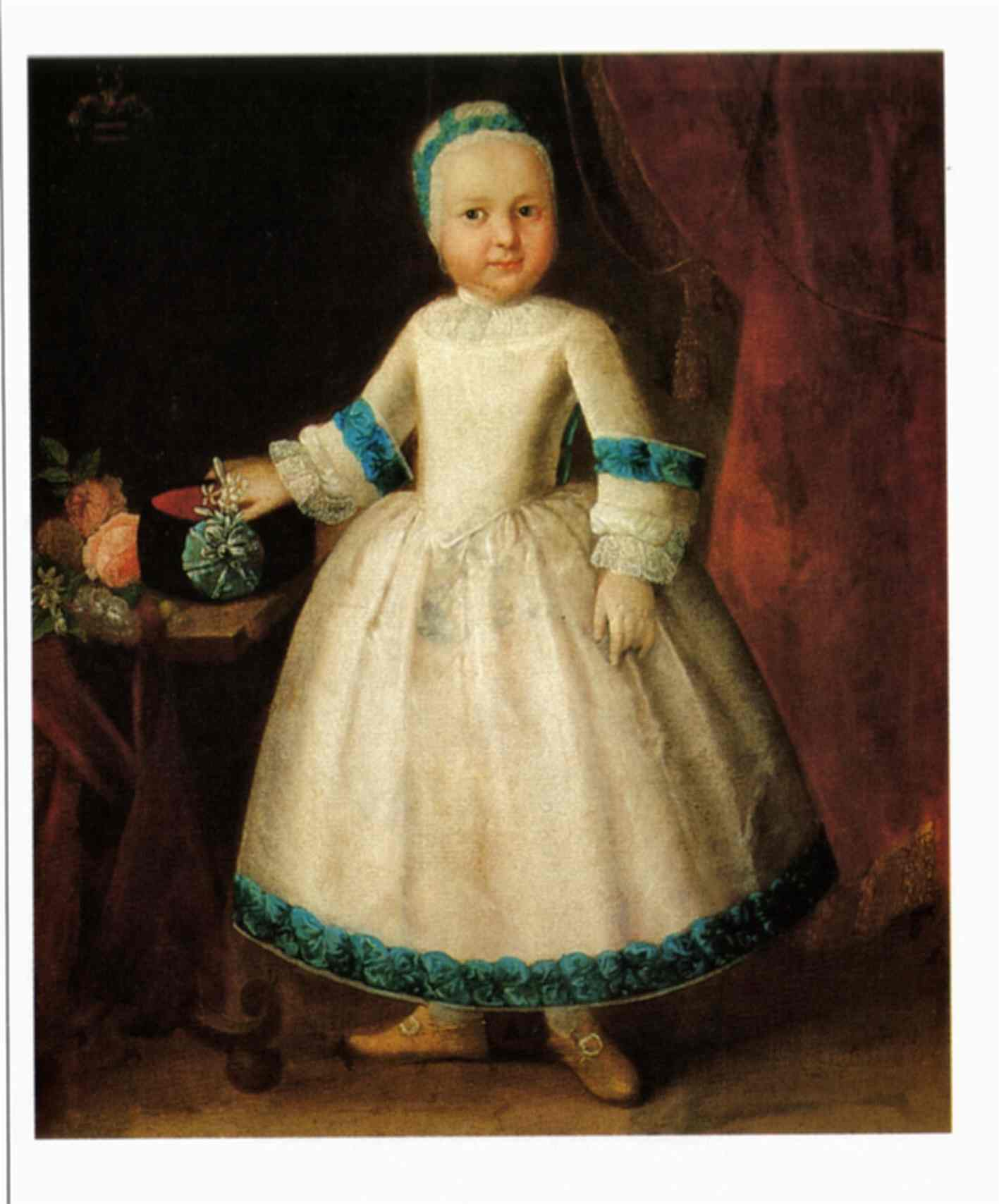 Portrait of Karl Friedrich Reinhard von Gemmingen (1739-1822)